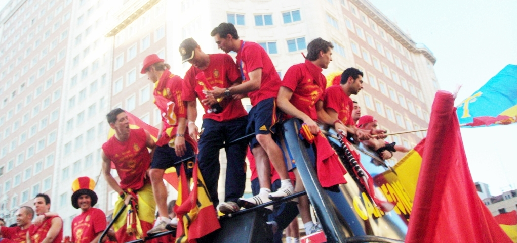 El autobús de los campeones el 12 de julio de 2010 a las 21.00 en la Plaza de España de Madrid, después de la histórica victoria que supuso el primer campeonato del Mundo de la selección.